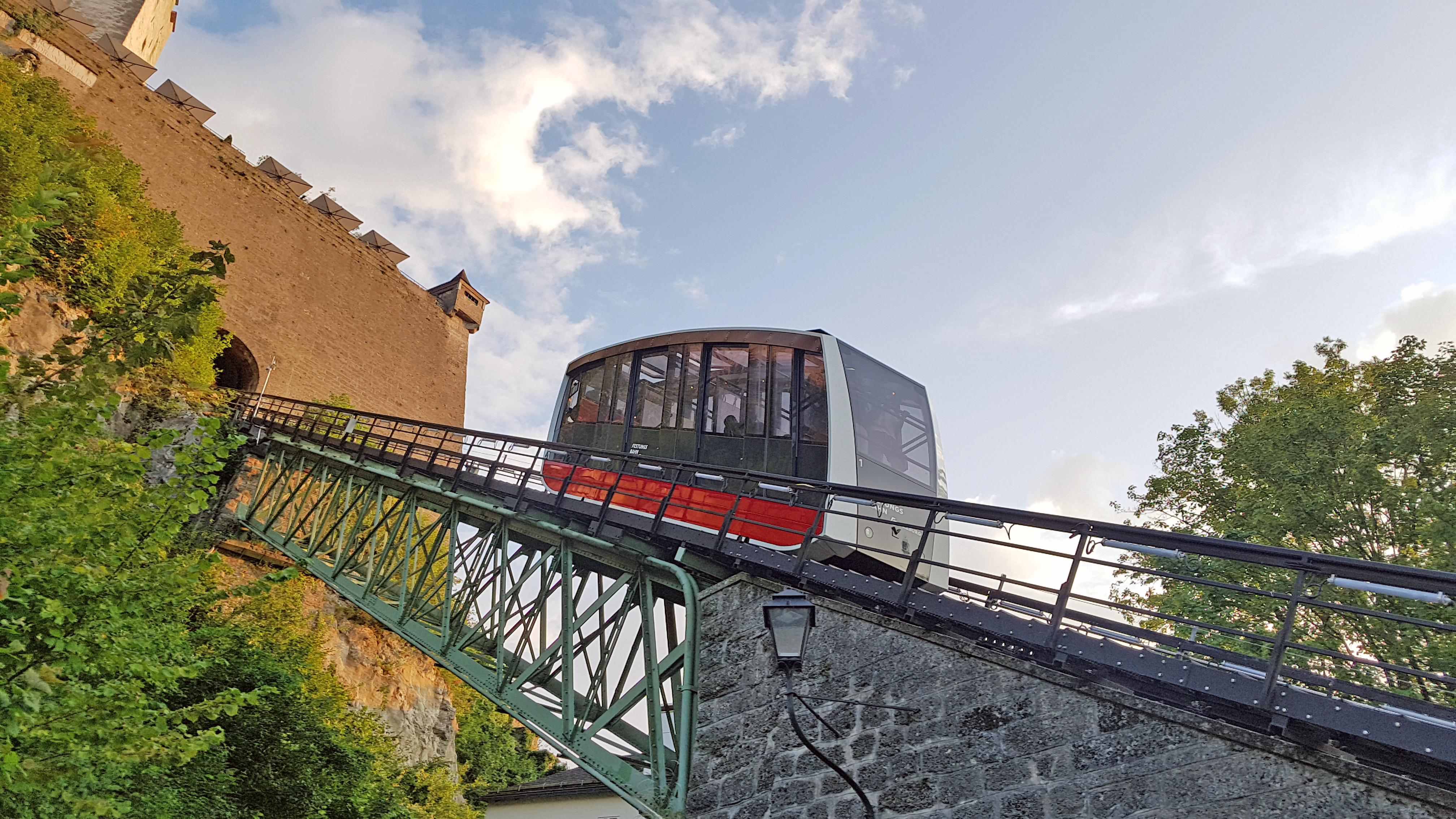 Festungsbahn Salzburg im August 2019